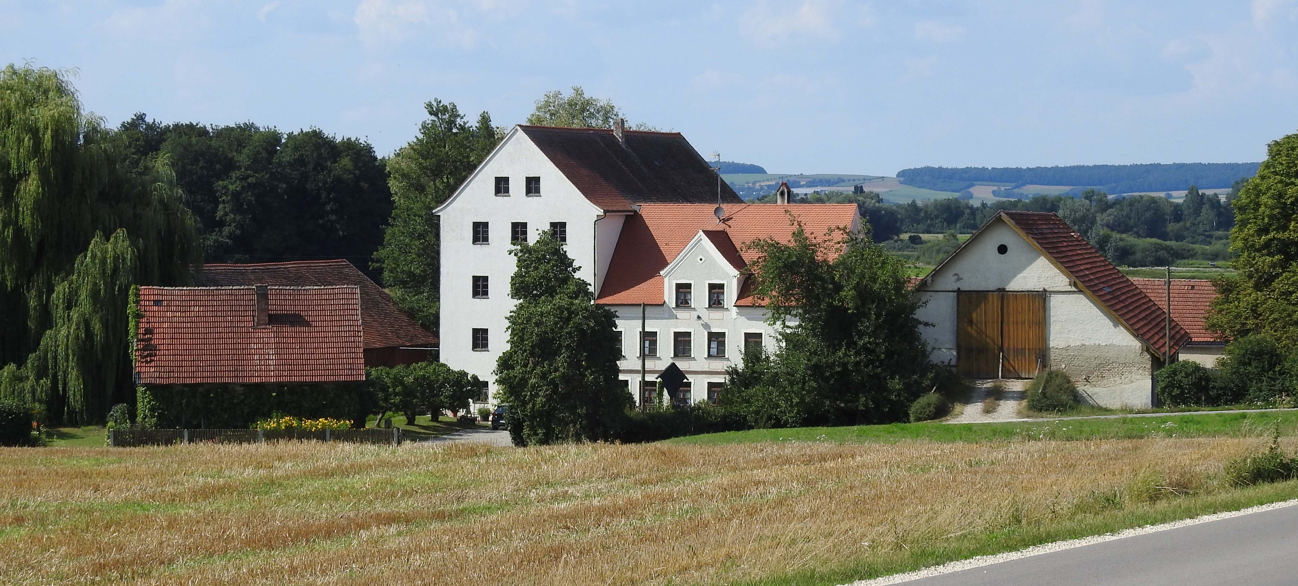 Schlagmühle bei Gempfing, Rain (Lech)